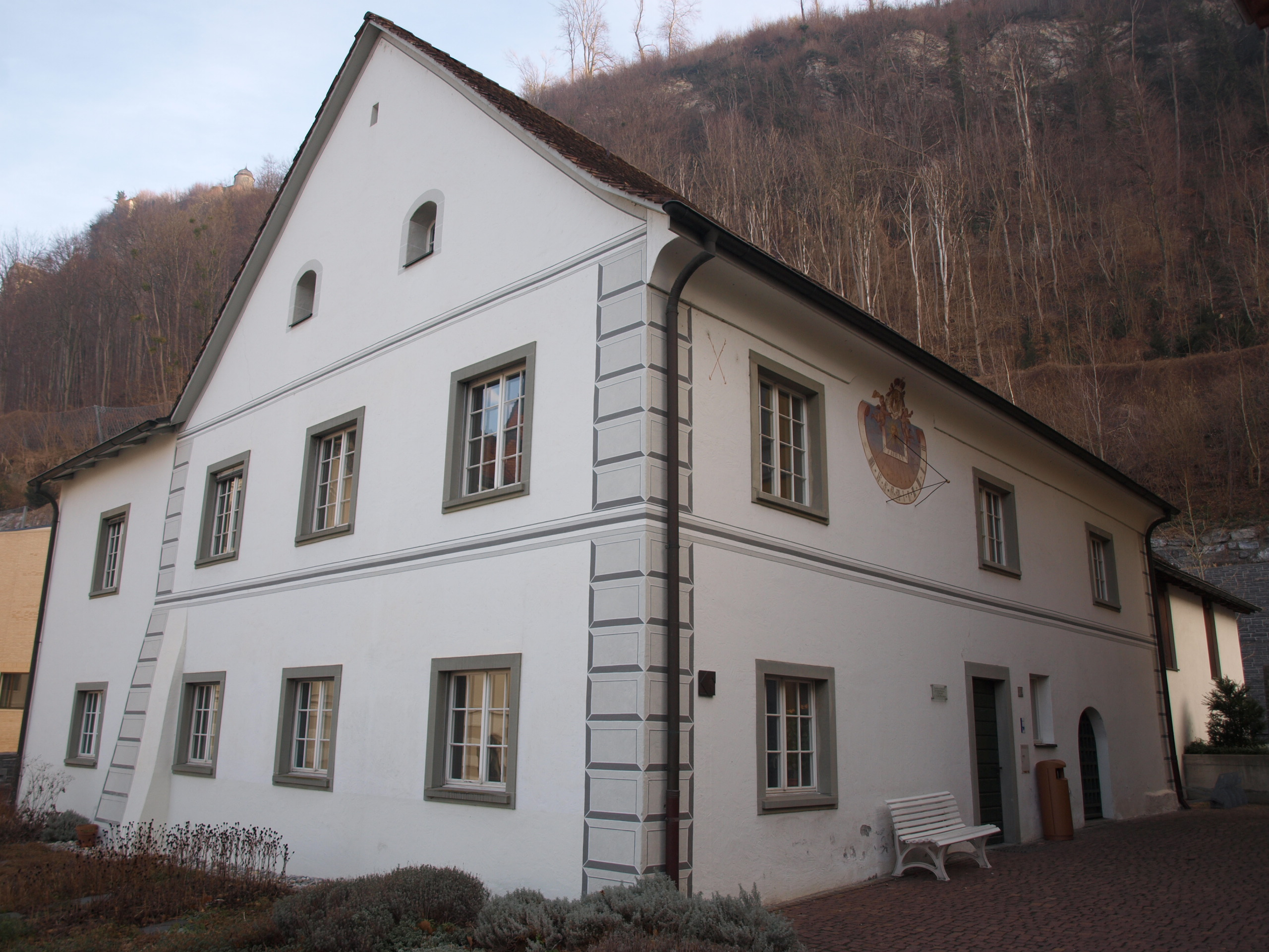 Josef Gabriel Rheinberger-Geburtshaus - Sicht Südosten